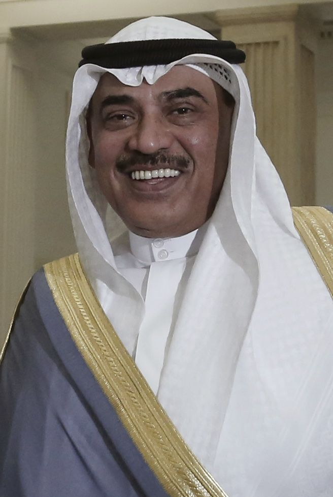 Tην Πέμπτη 12 Ιουνίου, o Αντιπρόεδρος της Κυβέρνησης και Υπουργός Εξωτερικών, Ευάγγελος Βενιζέλος, συναντήθηκε στο Υπουργείο Εξωτερικών, με τον Πρώτο Αντιπρόεδρο της Κυβέρνησης και Υπουργό Εξωτερικών του Κράτους του Κουβέιτ, Σεΐχη Sabah Khaled Al-Hamad Al-Sabah Πηγή: ΑΠΕ